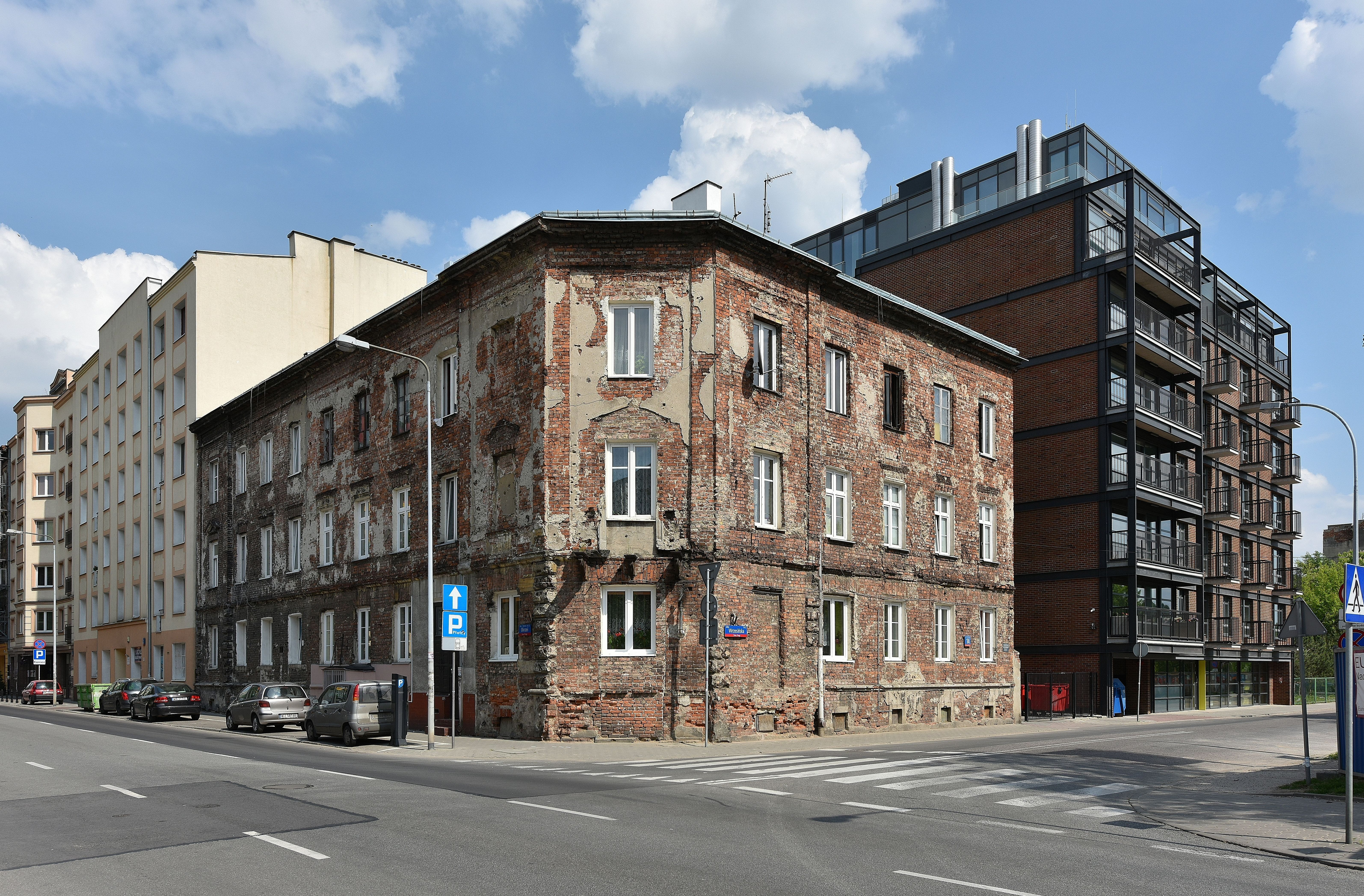 Ulica Wrzesińska przy Okrzei w Warszawie